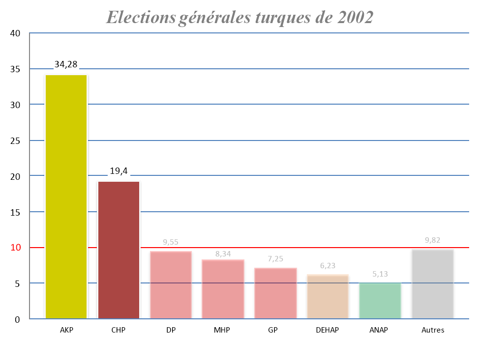 Représentation graphique des résultats des élections générales turques de 2002, mettant en avant le rôle du seuil de 10 % des suffrages exprimés à atteindre pour recevoir des sièges.